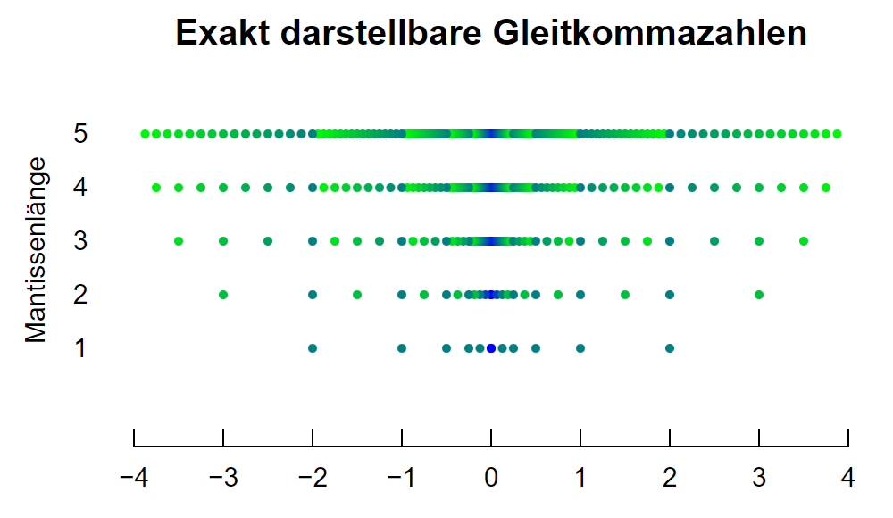 Grafische Darstellung von exakt repräsentierbaren Gleitkommazahlen, wie in IEEE 754-2008 beschrieben, inclusive denormalisierter Zahlen